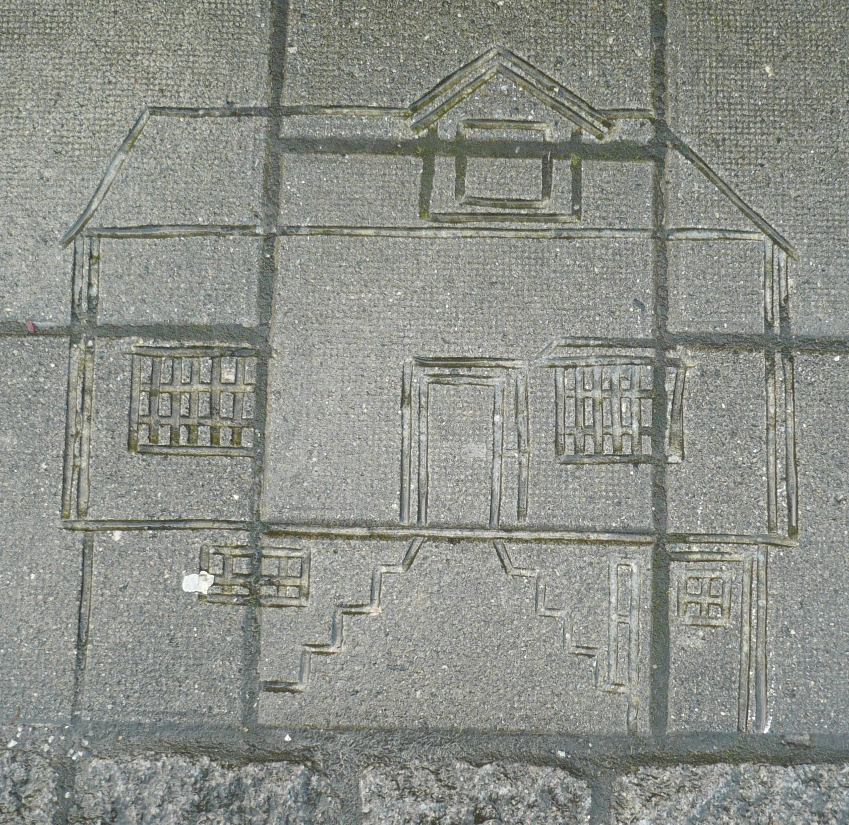 Skisser av hus er laget foran mange av husene i Pedersgata.